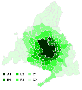 Mapa de las Zonas de Transporpe público de Madrid en 2006.